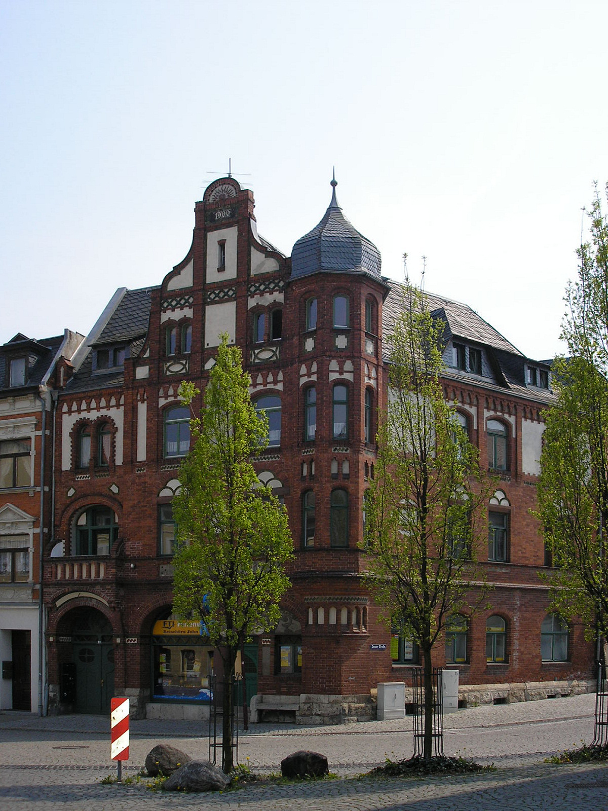 Ein Haus in der Altstadt von Apolda (Thüringen).